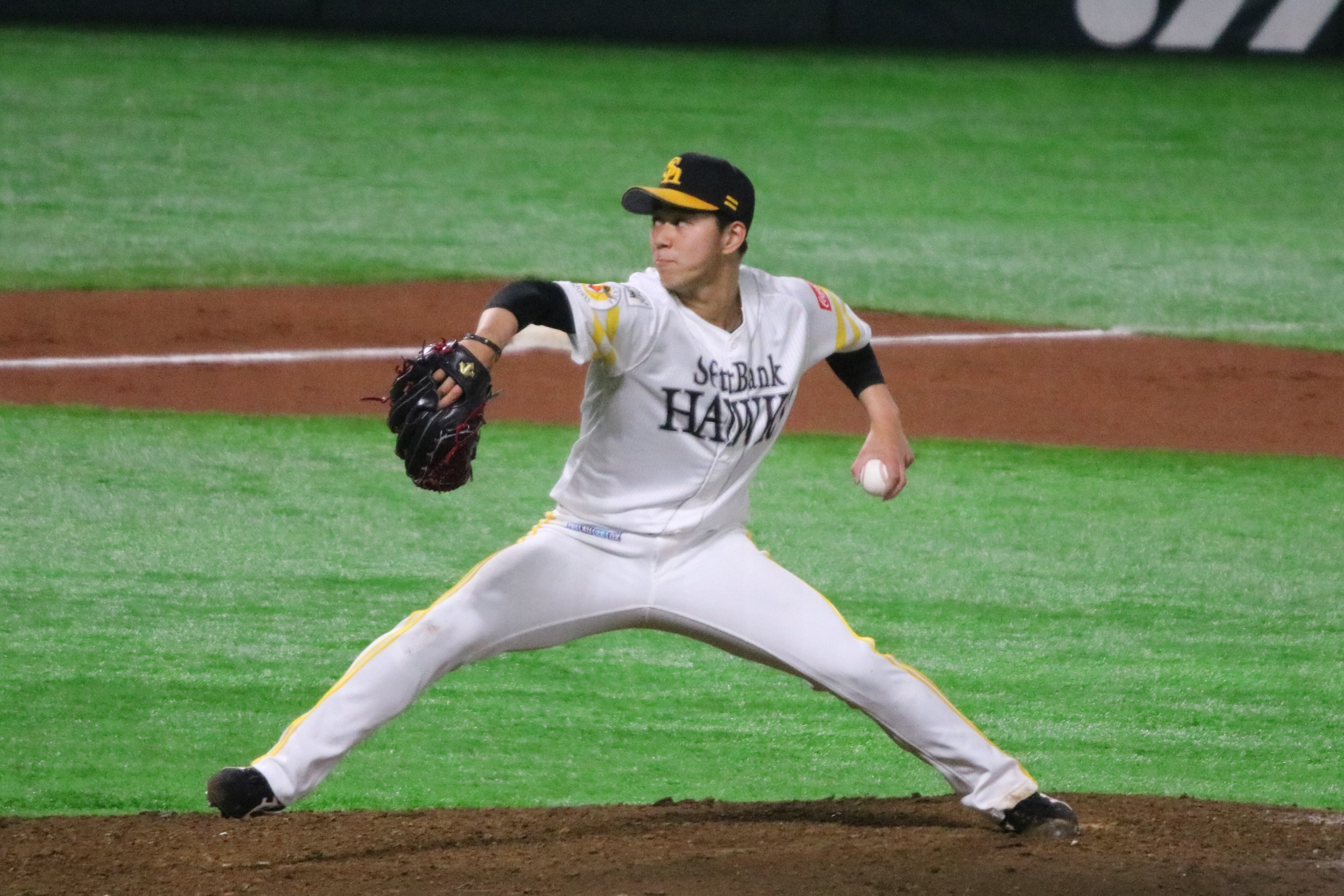 2018年3月24日 対広島東洋カープ